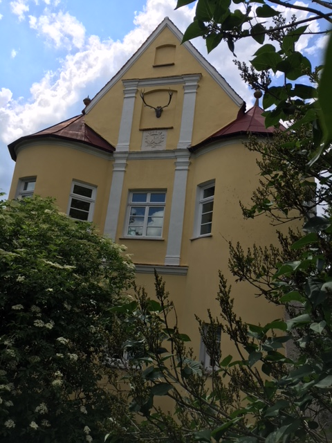 Westfront des Schlosses mit Wappen